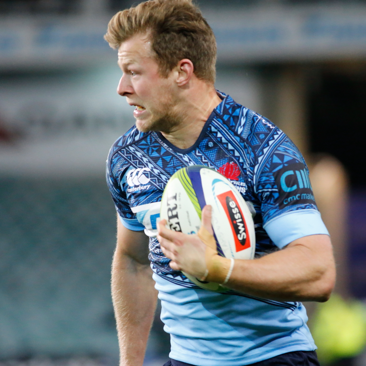 2017.07.08.20.58.46-WARvJAG-0006